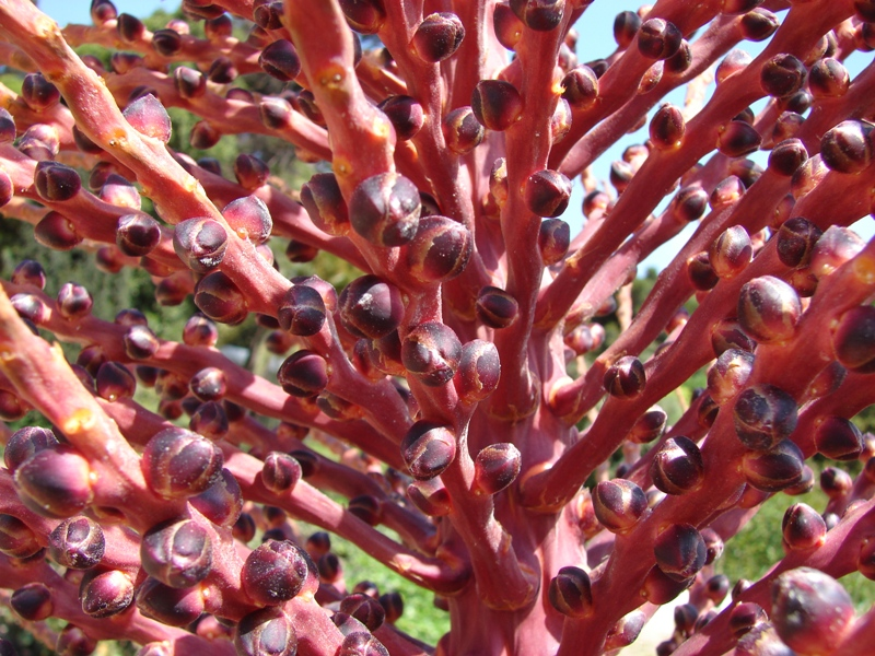 Femeninas ubicadas en el centro de la inflorescencia